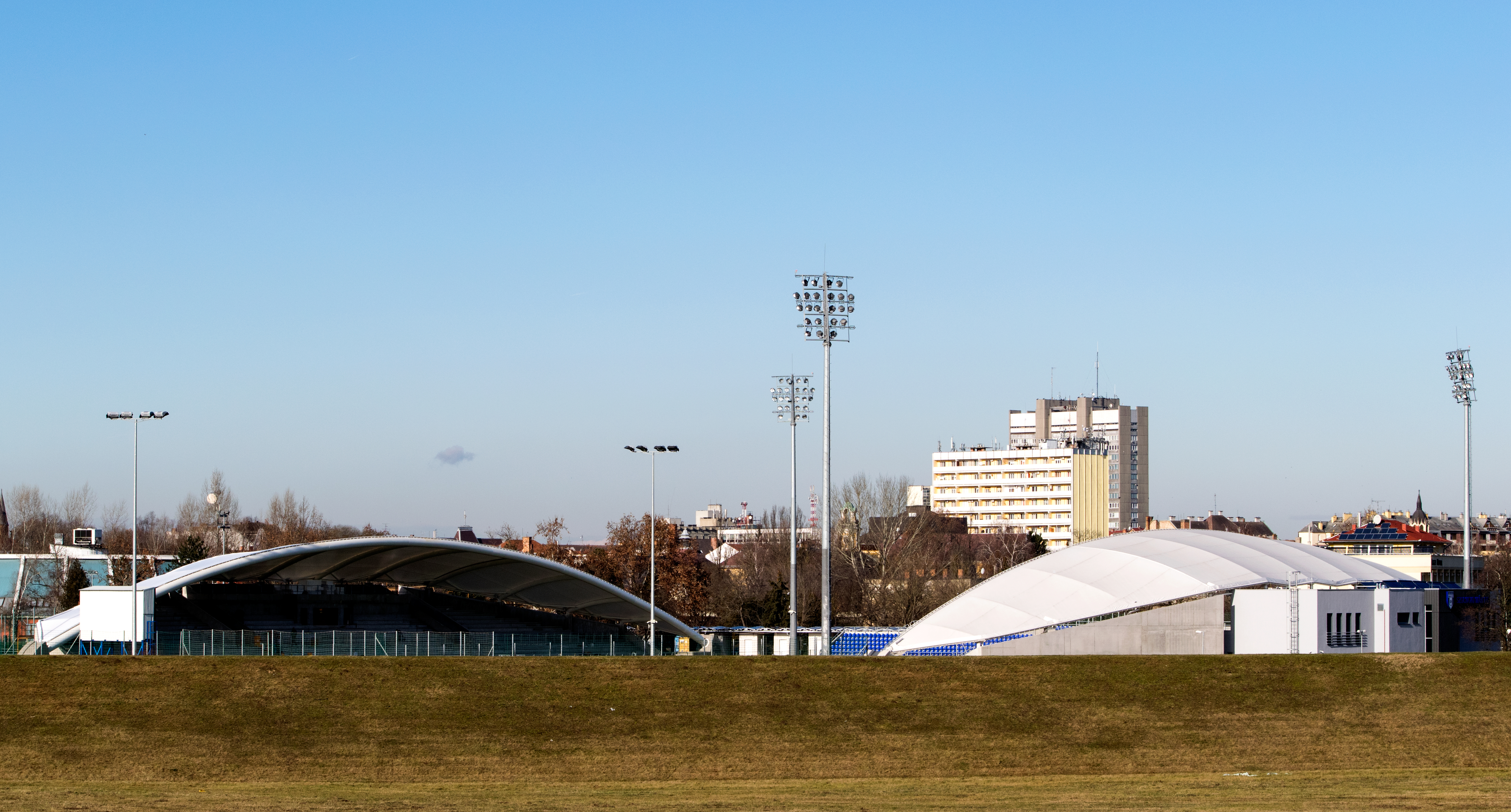 A szolnoki tiszaligeti stadion a Tisza ártere felől.